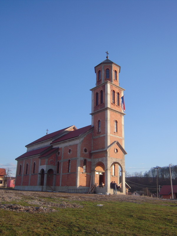 Изградња_православне_цркве_у_Пријечанима (Бања Лука)